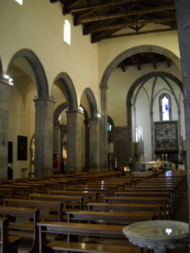 Fondi Chiesa Santa Maria in Piazza Interno